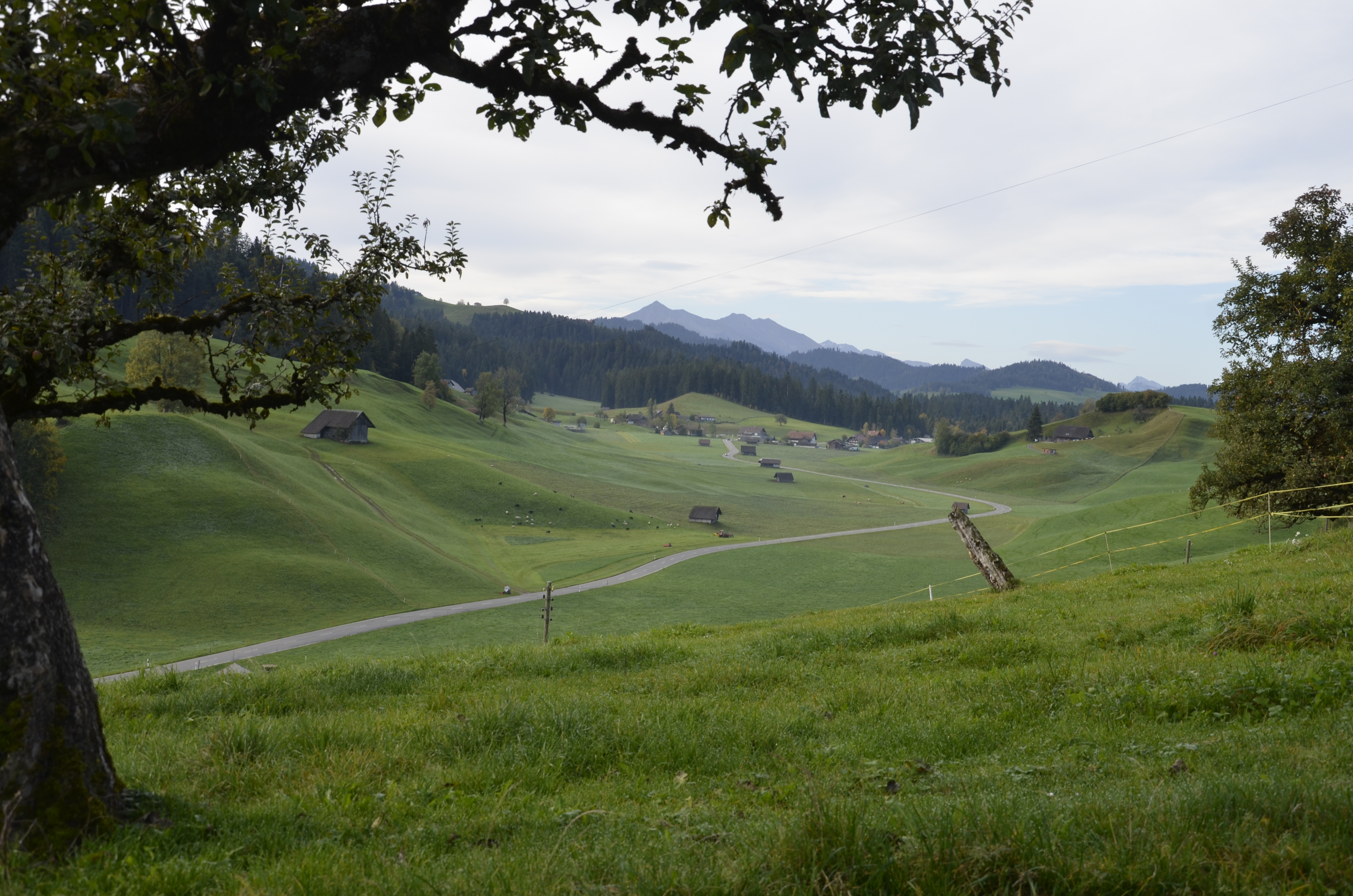 Kanton Bern (Schweiz): Süderemoos, Gemeinde Oberlangenegg. Im Hintergrund der Niesen.